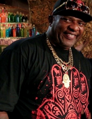 Mr. Catra, nome artístico de Wagner Domingues da Costa (Rio de Janeiro, 5 de novembro de 1968), é um compositor e cantor brasileiro. Mr. Catra é considerado o Rei do Funk Carioca no Brasil.